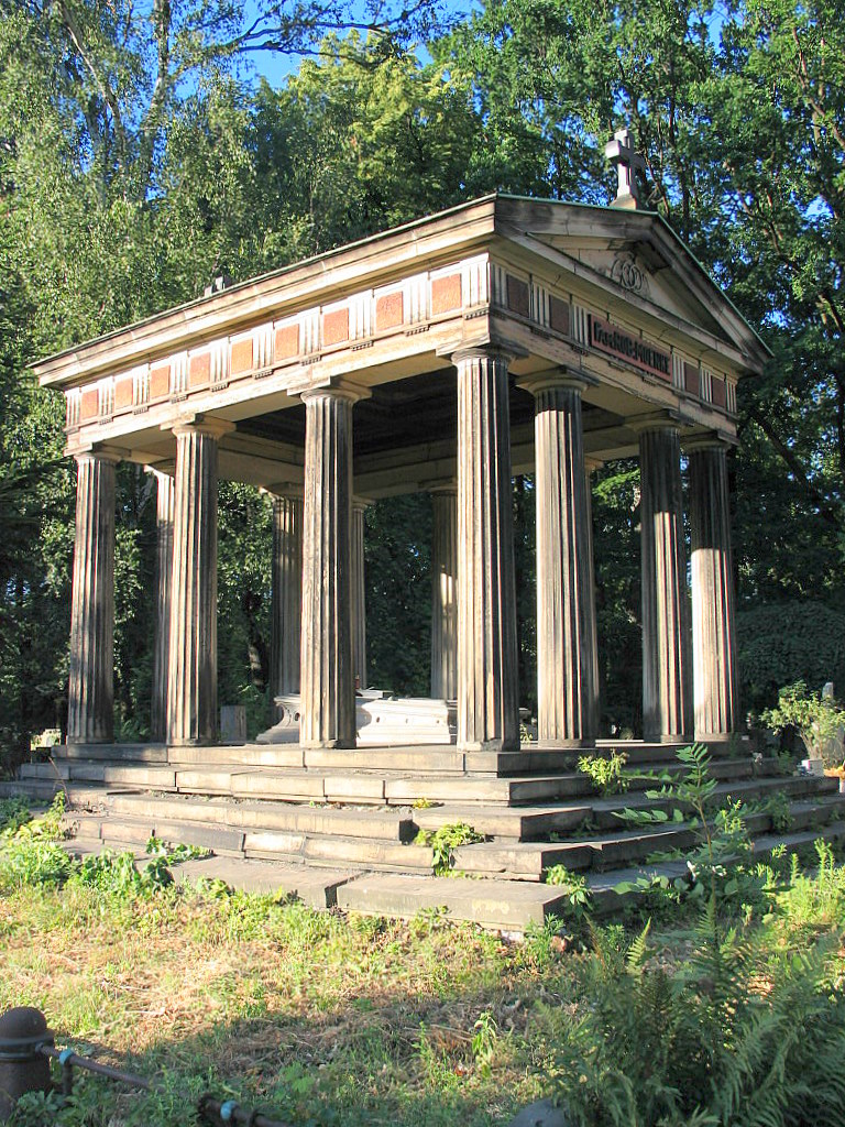 Grobowiec rodzinny Moenke Łódź